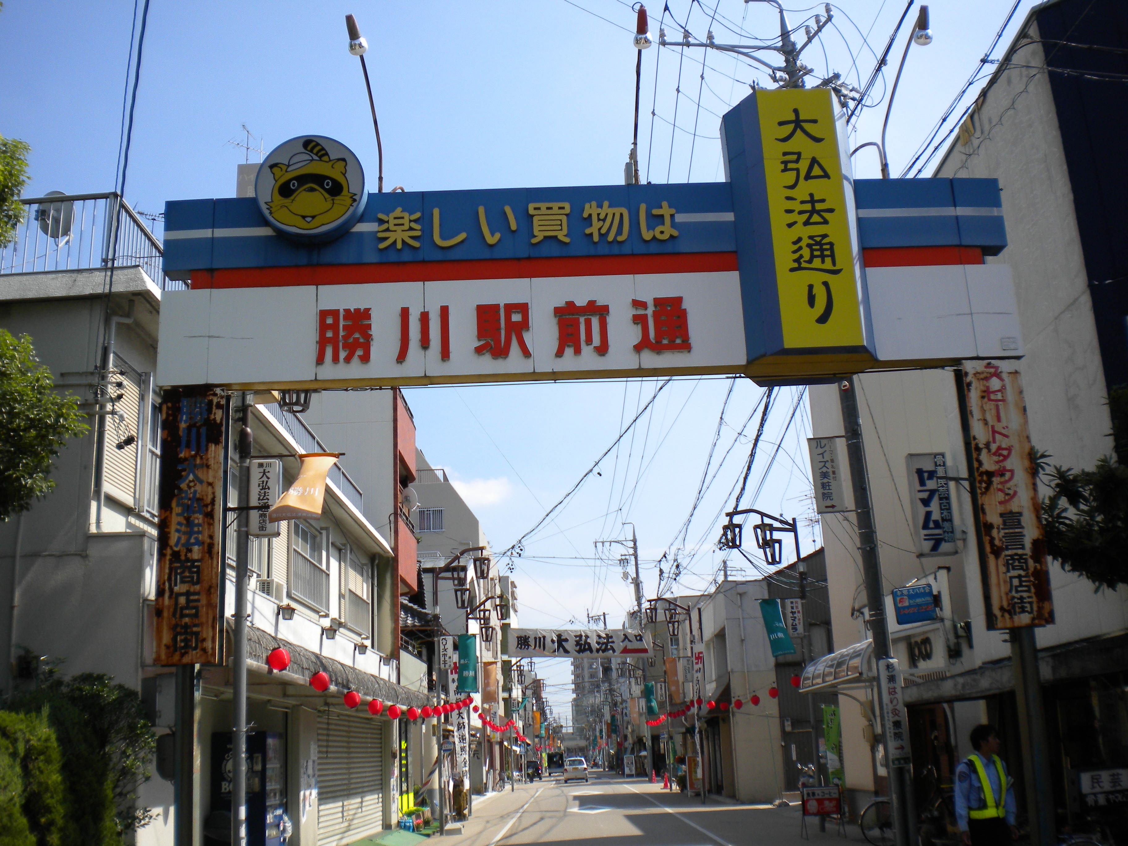 愛知県春日井市の勝川駅前商店街